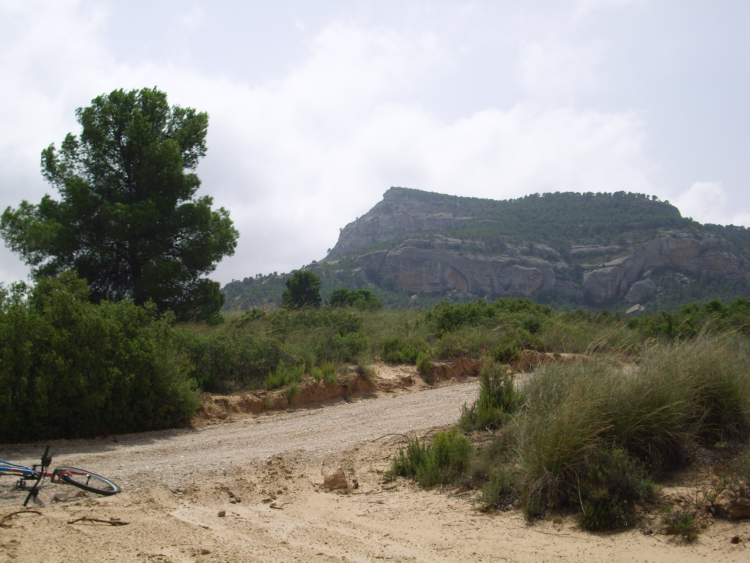 Monte Arabí desde el lado norte